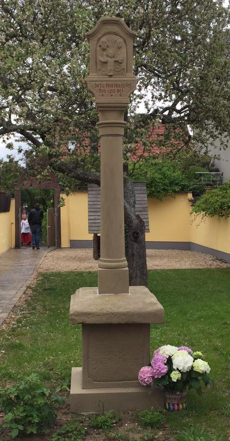 Bildstock Heilige Familie am Kindergarten Kist